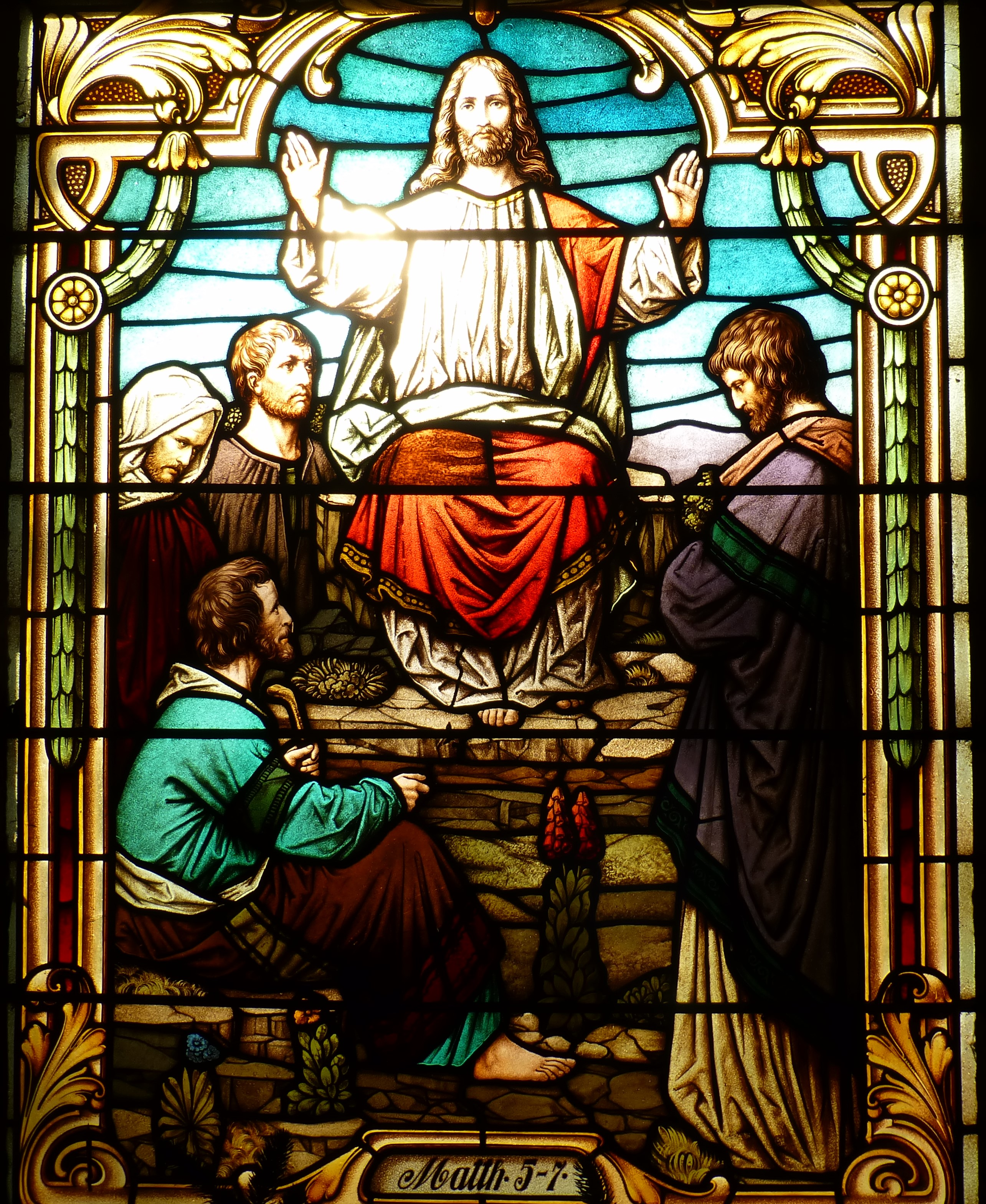 Kirche St. Nikolaus zu Gera-Roschütz, Buntglasfenster, dargestellt die Bergpredigt von Jesus Christus